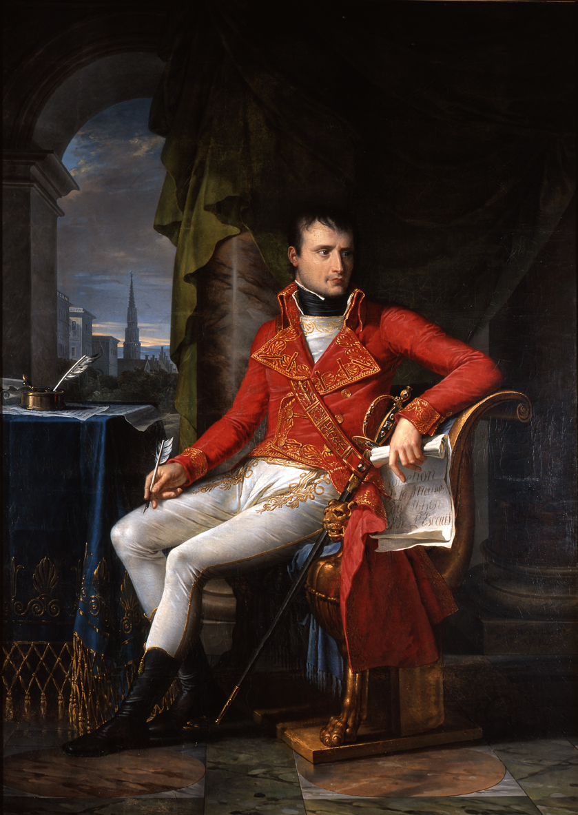 Bonaparte premier consultitle QS:P1476,fr:"Bonaparte premier consul" label QS:Lfr,"Bonaparte premier consul"